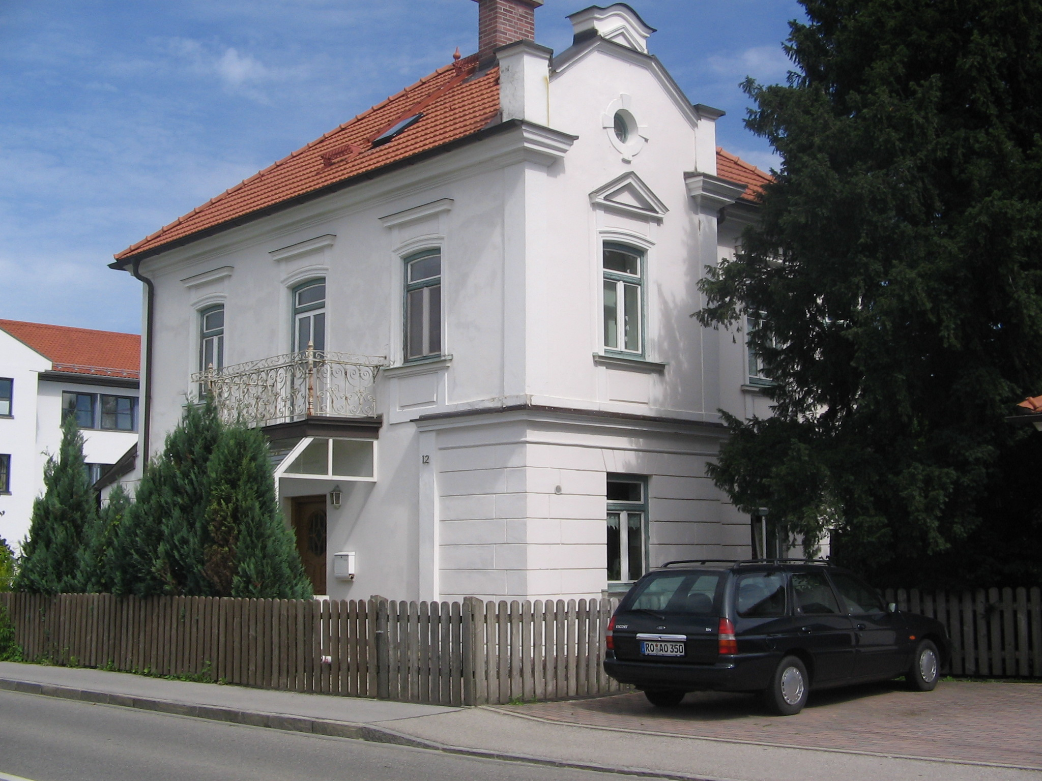 Möglicherweise handelt es sich auf dem Bild um "Ehemaliger Pfarrhof in Bruckmühl". Wahrscheinlich ist es jedoch eine alte Gärtnerei, siehe Diskussionsseite.